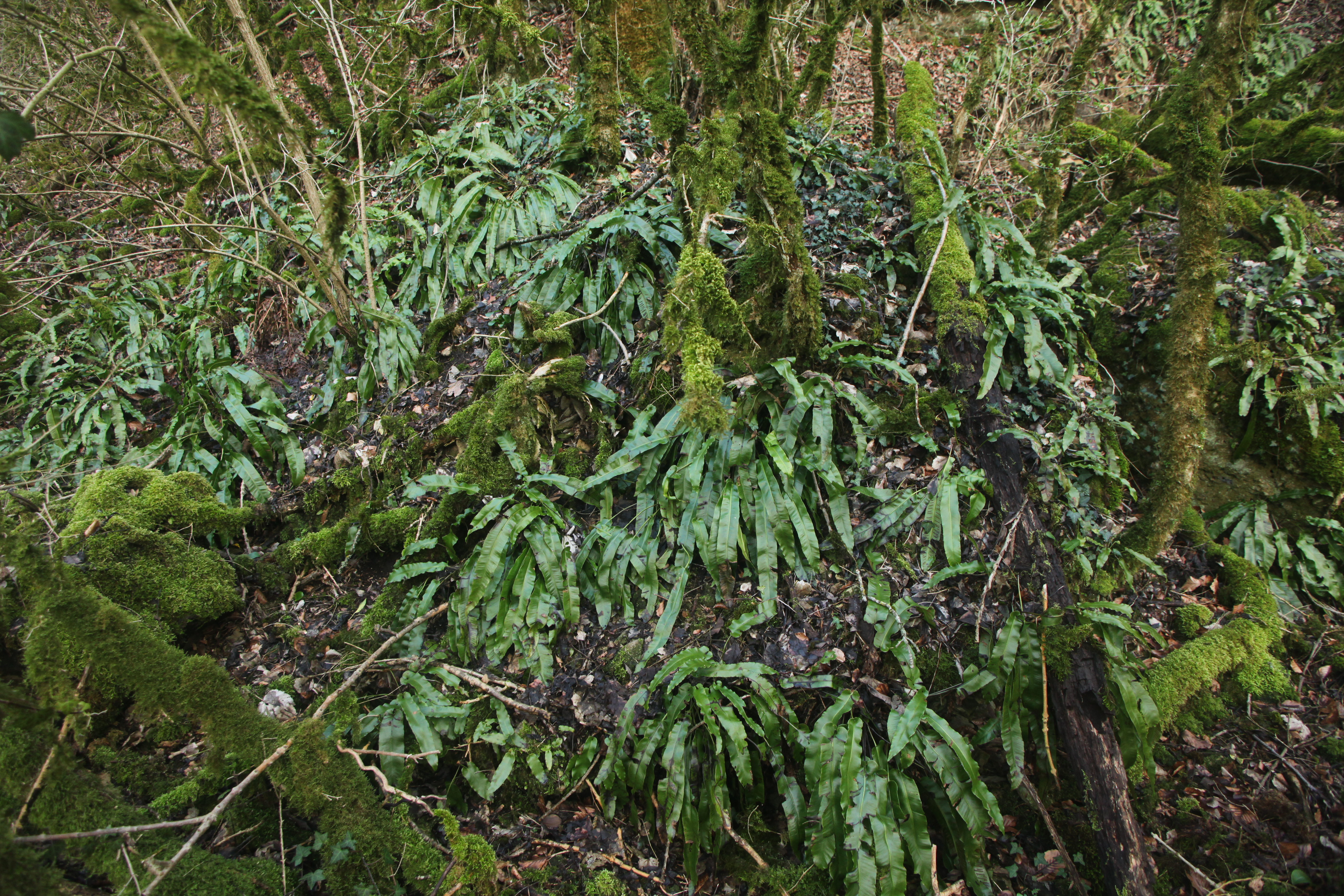 Erablaie à scolopendre.